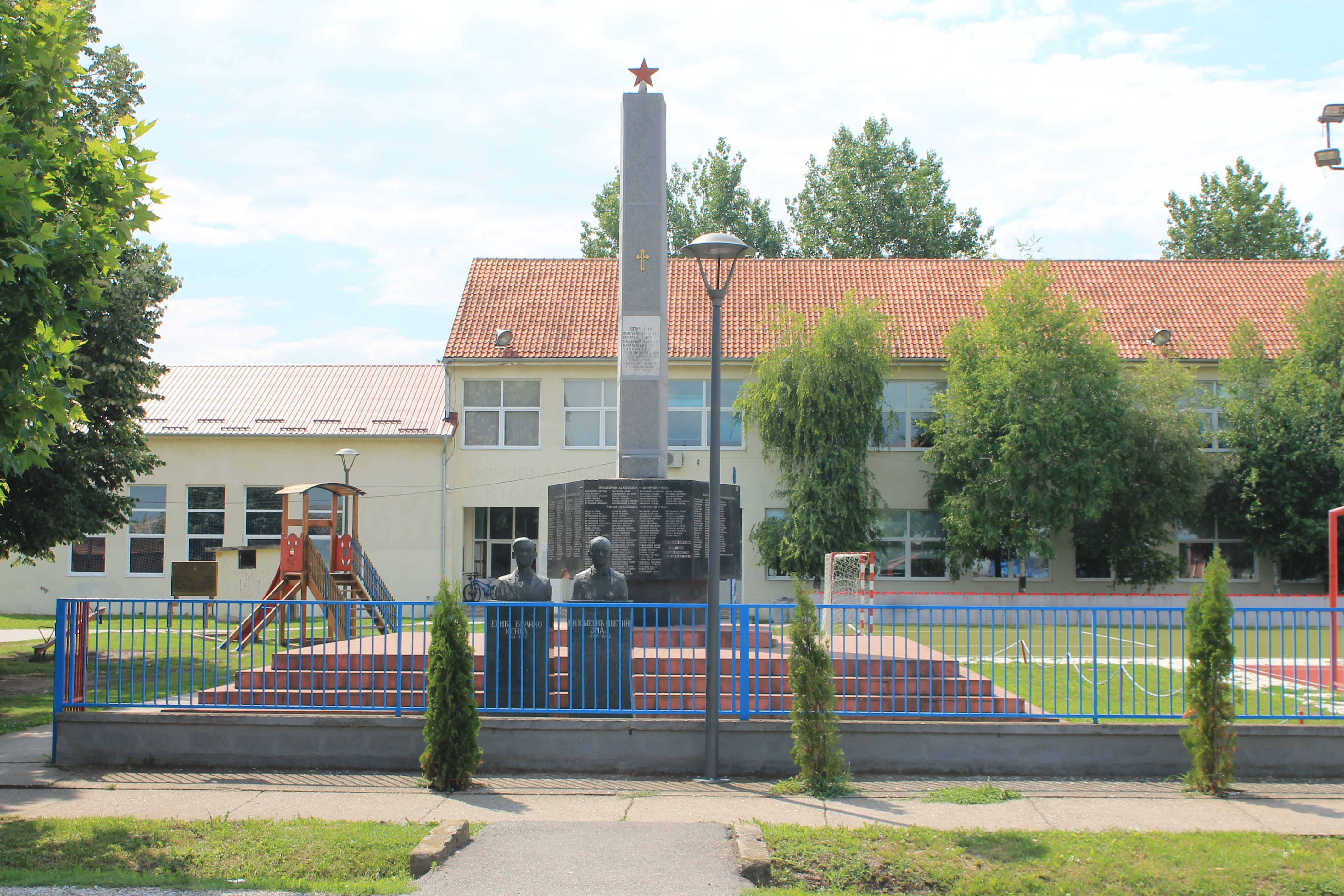 Споменик у Адашевцима